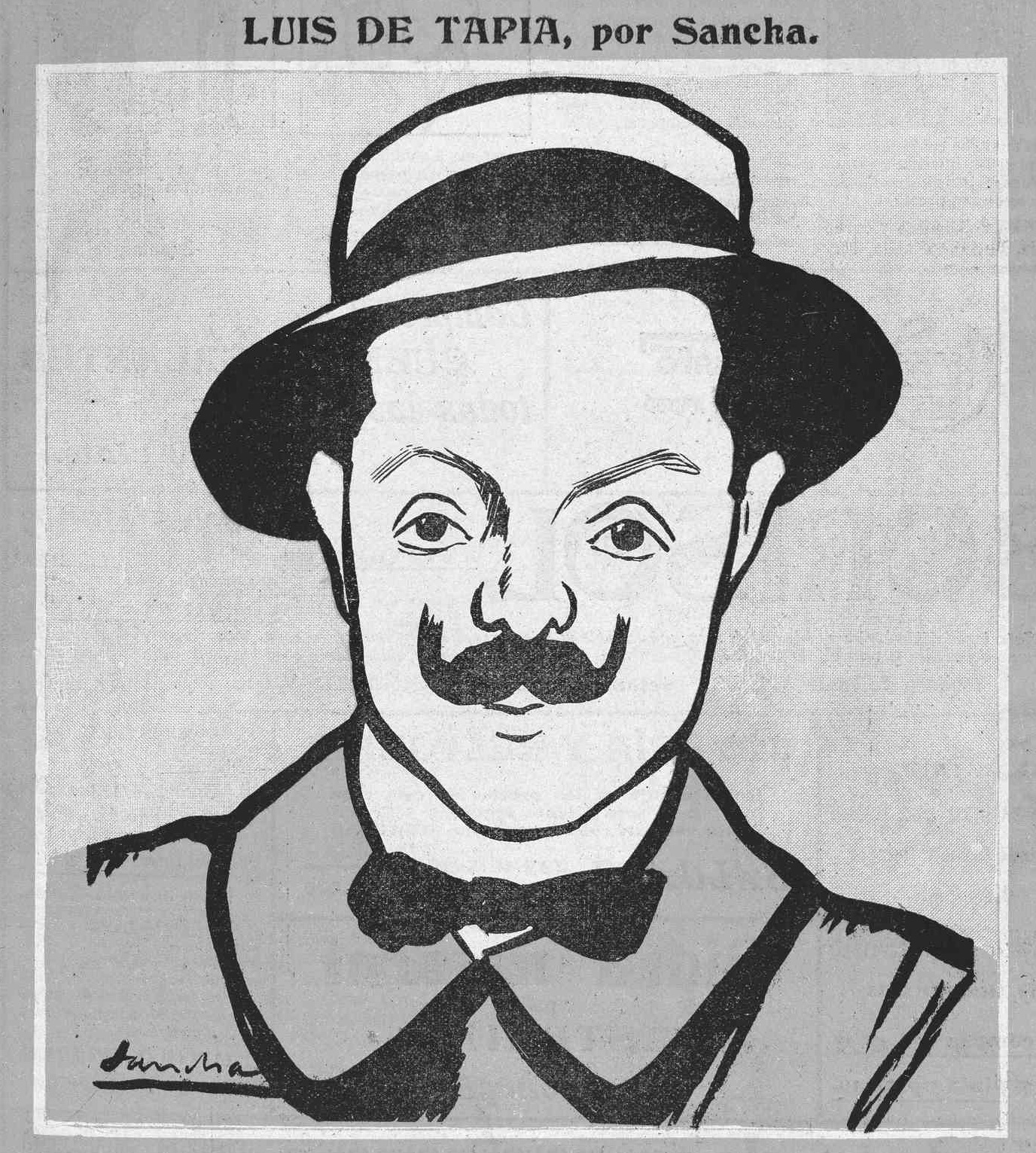 Luis de Tapia.Sus versos son aguijonesque dan pinchazos cruelesy en distintas ocasionesél dispara sus Bombonescontra los que hacen pasteles.